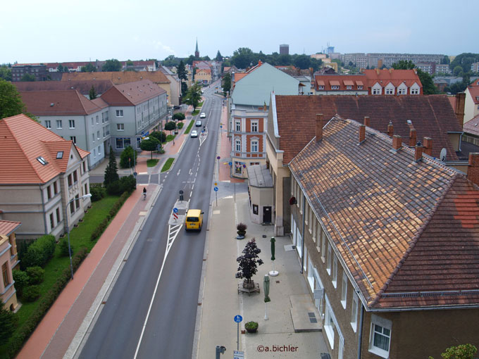 Weißwasser, ein Blick auf die Muskauer Straße.